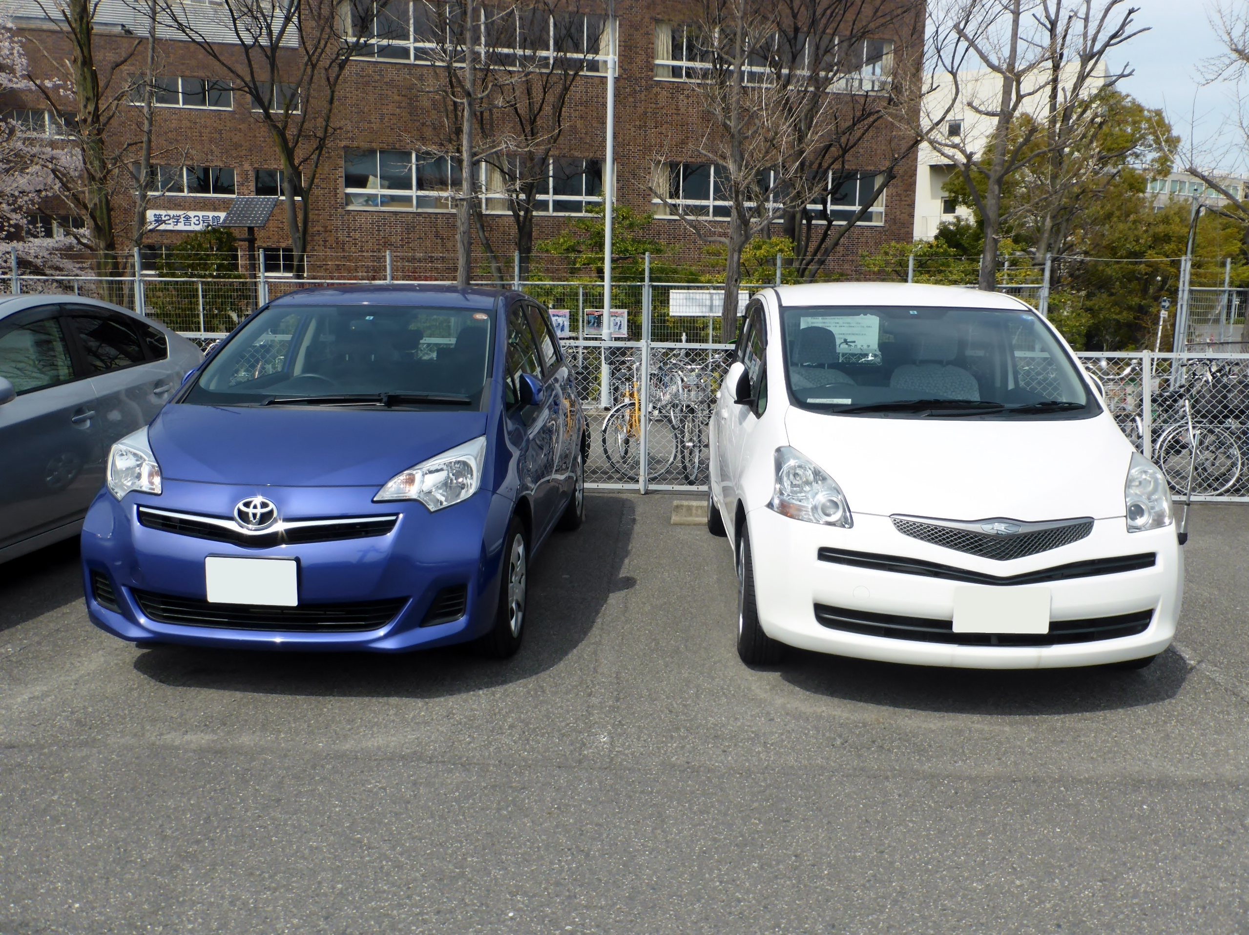 トヨタ・ラクティスのCP100型とCP120型のそれぞれをフロントから撮影。